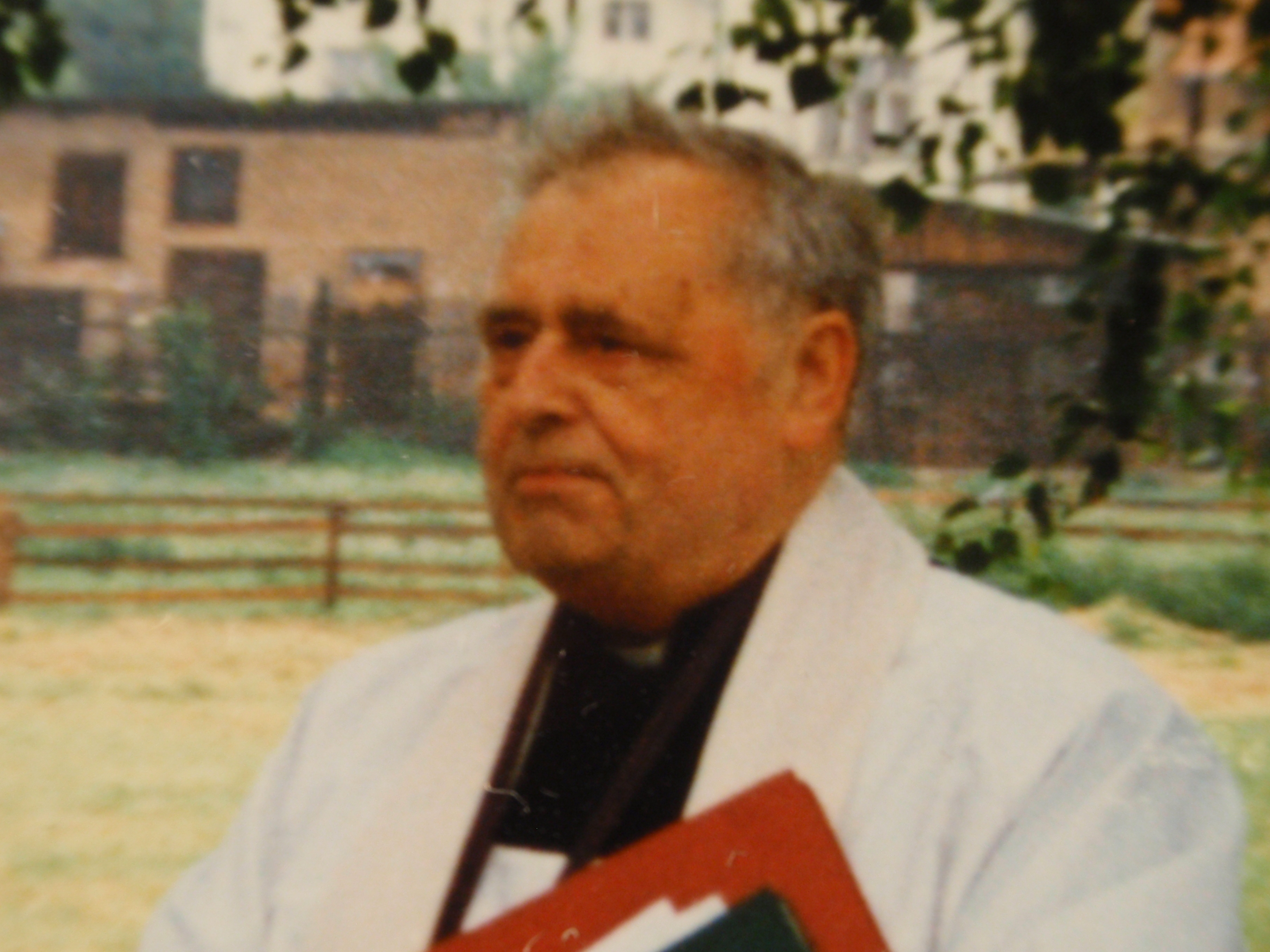 P. Jiří Mošna os. arciděkan